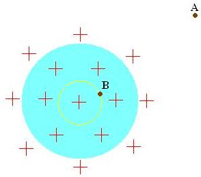 Esfera maciza. Campo eléctrico generado por una distribución continua volumétrica de carga.